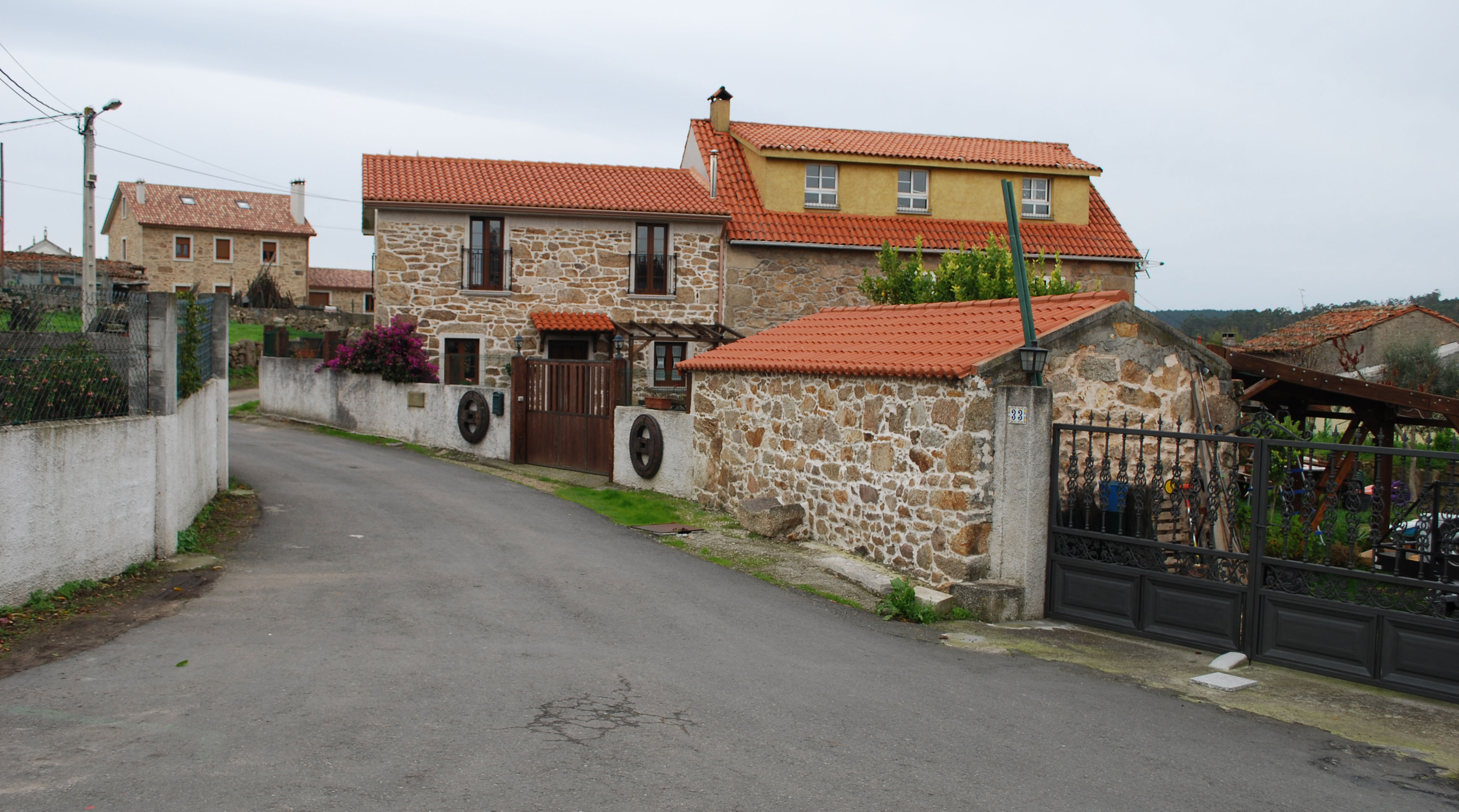 Vista rúa de Freán, parroquia de Morás, concello de Arteixo (A Coruña, Galiza)